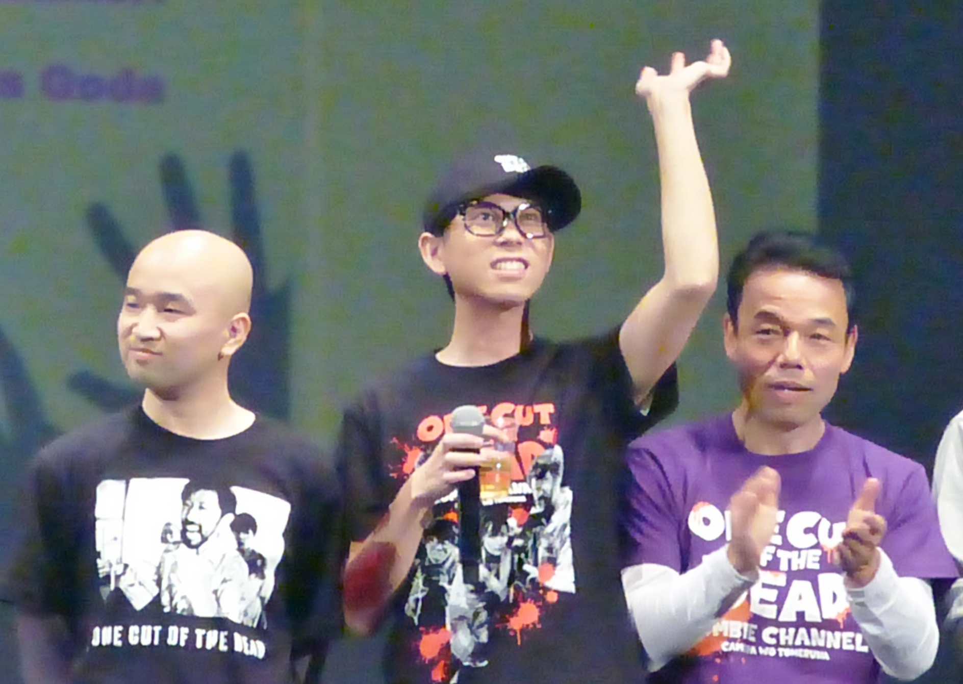 山﨑俊太郎、市原洋、細井学（2018年11月22日、Zeppダイバーシティ東京「最高かよ〜！『カメ止め！』アツアツ感染者集会〜ポンデミック2018〜」）